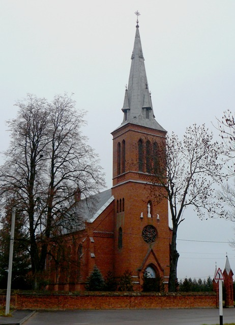 Костел Св. Антония Падуанского (1908), д. Каменка, Щучинский район, Гродненская область. Фото путешествия по Беларуси.